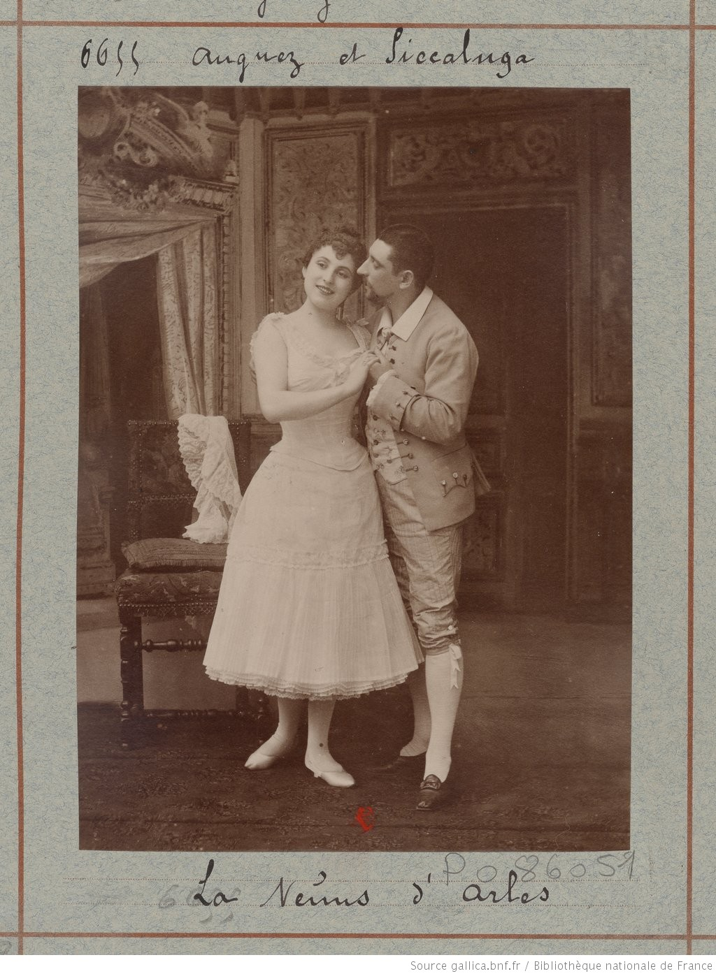 Mathilde Auguez et Albert Piccaluga dans la Vénus d'Arles ; atelier Nada extrait de l'abum n°32